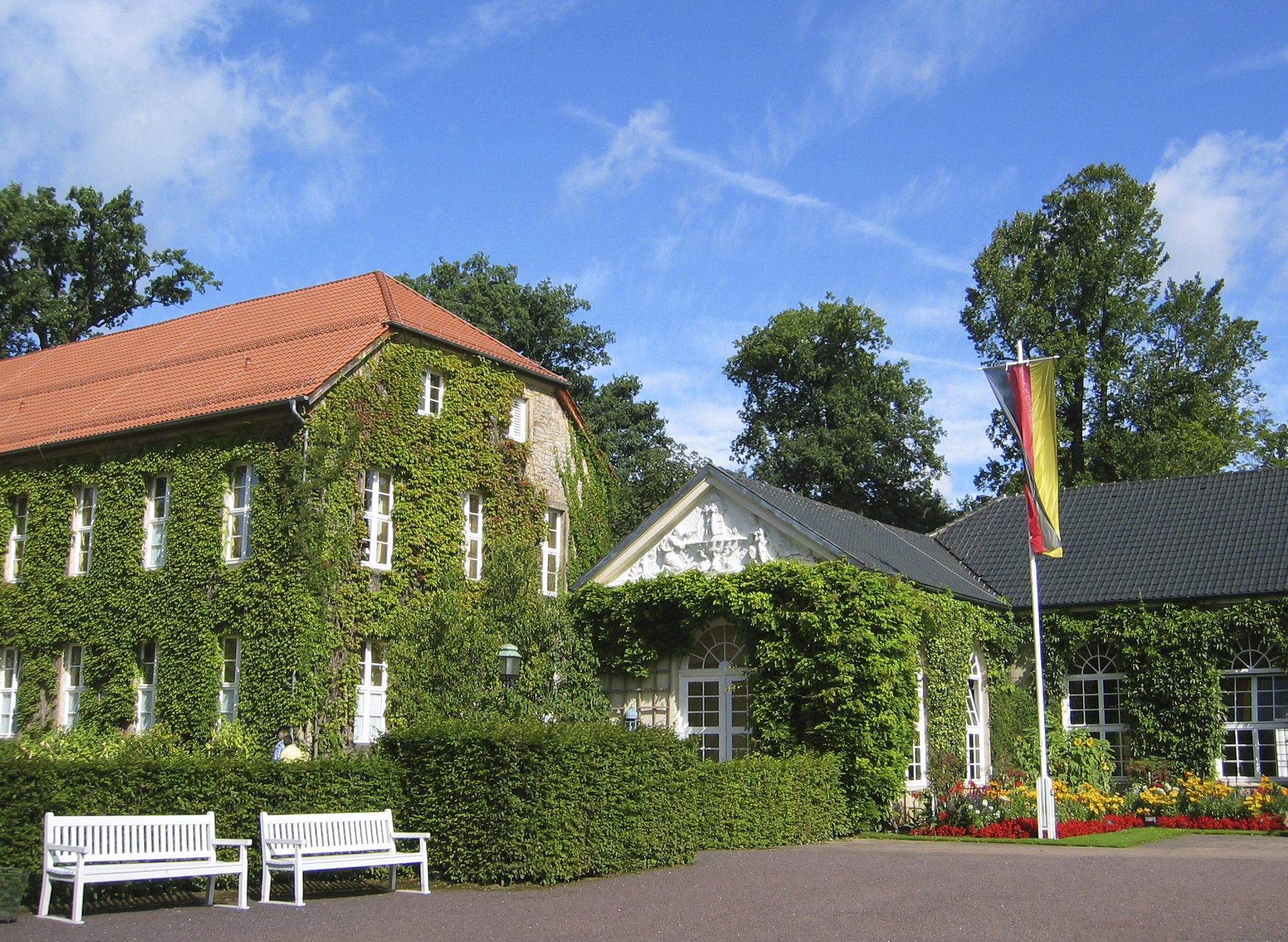 Brunnenarkaden im Gräflichen Park Bad Driburg (Kurpark), Bad Driburg, Deutschland.